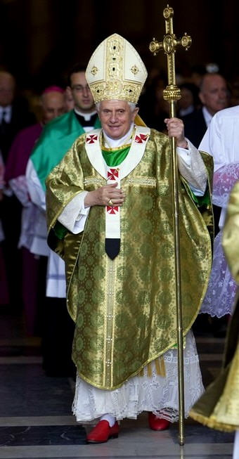 Ouverture du synode par le pape Benoît XVI - 05 octobre 2008 Le pape est revêtu de la dalmatique et de la chasuble. Il est coiffé de la mitre précieuse et tient en main la férule.